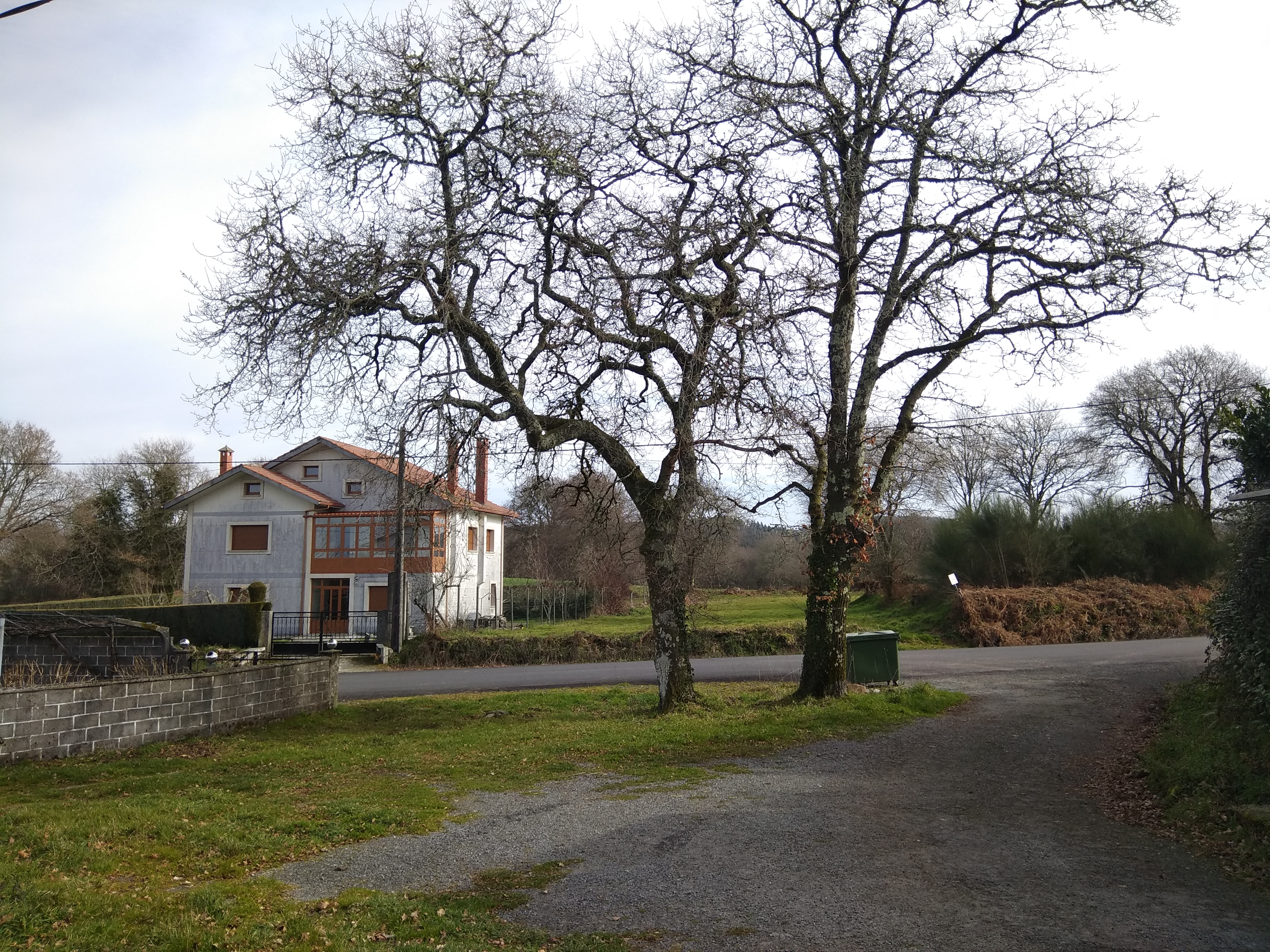 Vista de Cimadevila (Cumbraos, Sobrado, Galiza).